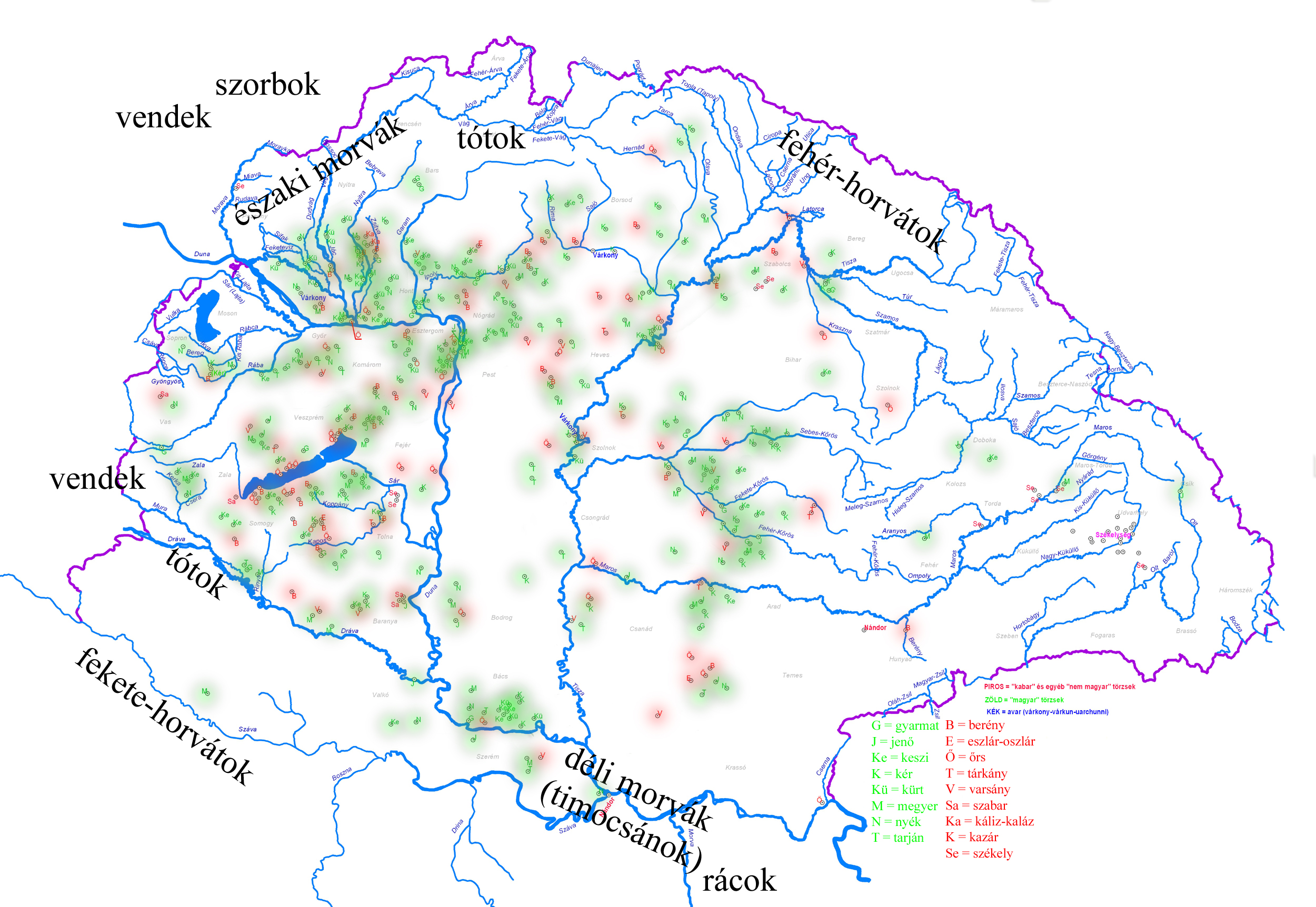 A magyar törzsnevek összesített előfordulása a Kárpát-medencében, a kabarokkal együtt